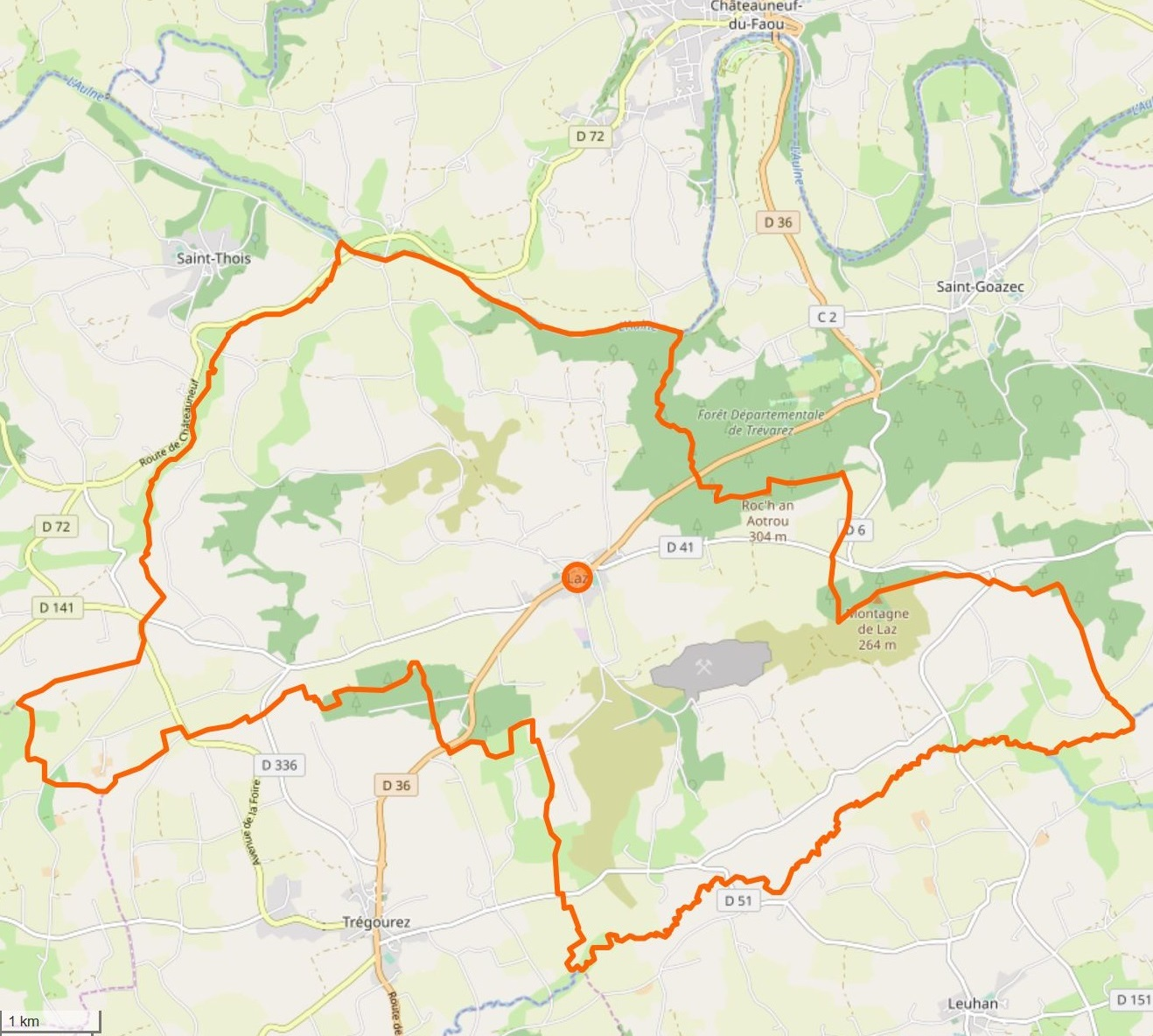 Cette carte a été créée à partir des données du projet Openstreetmap. This map may be incomplete, and may contain errors. Don't rely solely on it for navigation.